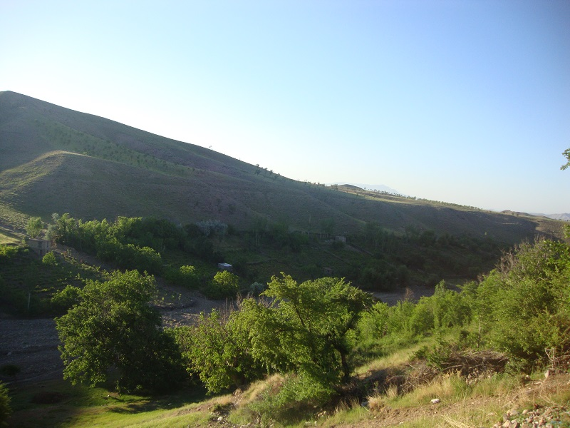 طبیعت سرسبز و گردشگری روستای جهان، عکس از احمد نیک گفتار روستای جهان، احمد نیک گفتار